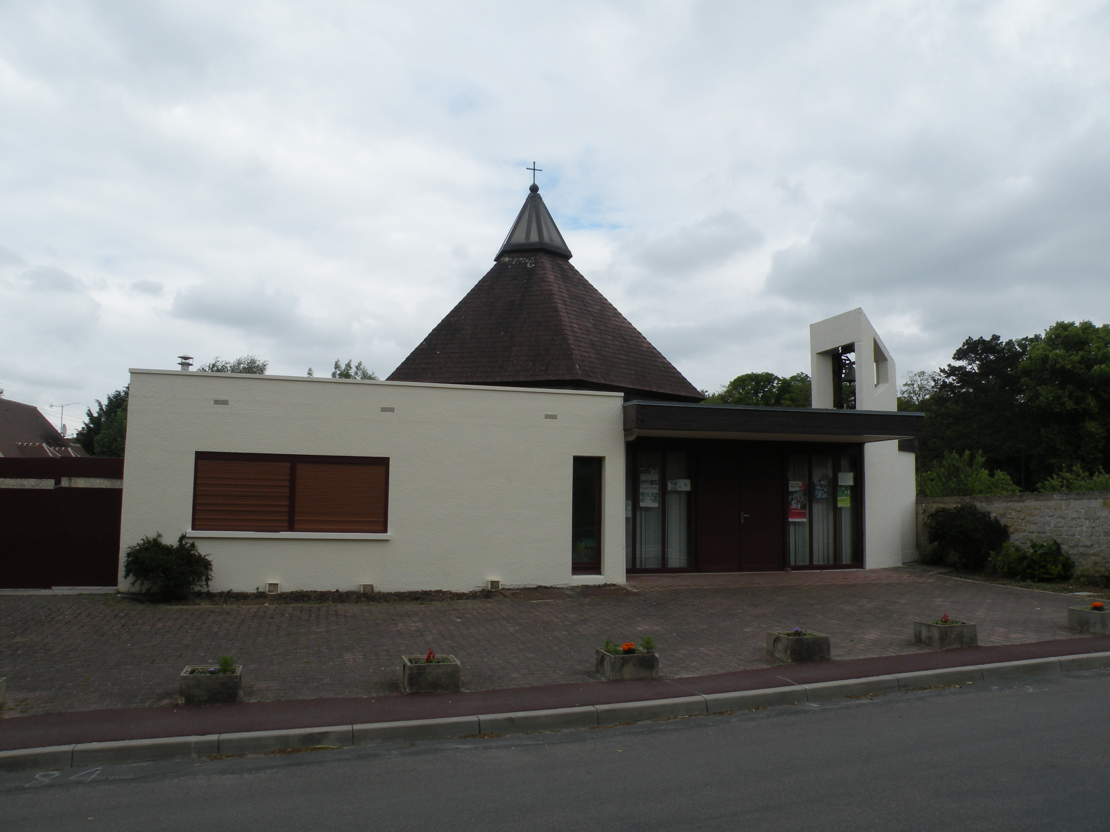 église de Mours Val d'Oise France